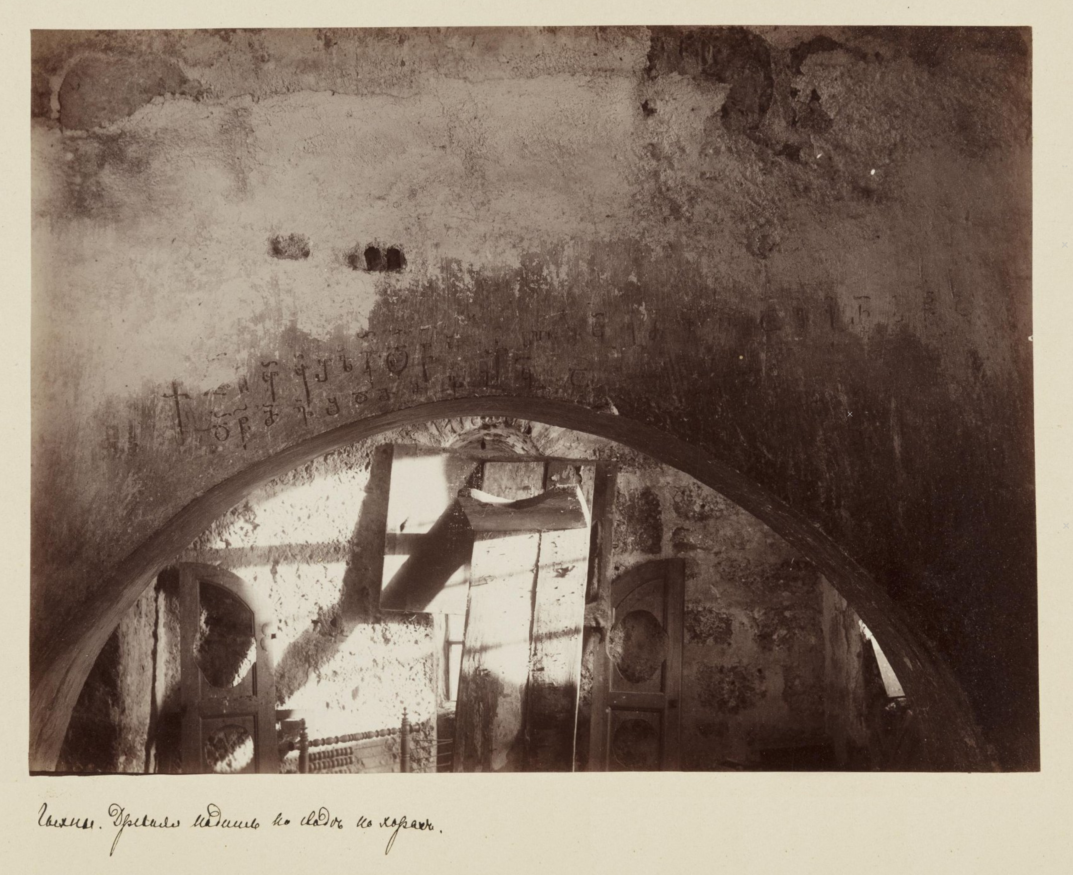 ლიხნის ტაძრის წარწერა